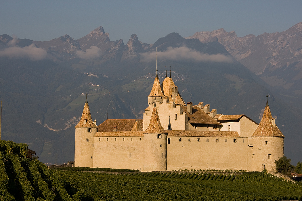 Château d'Aigle (Schloss Aigle)